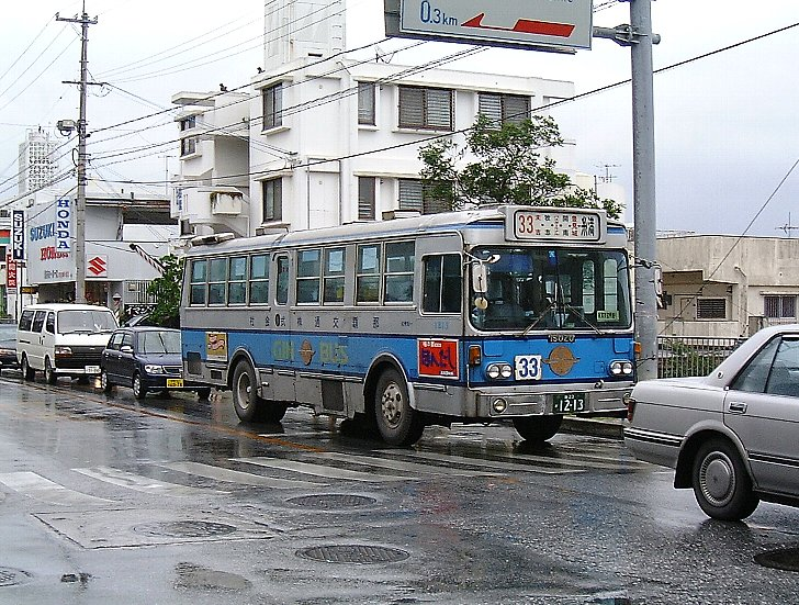 那覇交通（現・那覇バス） 旧塗色。いわゆる「銀バス」 浦添市前田付近にて